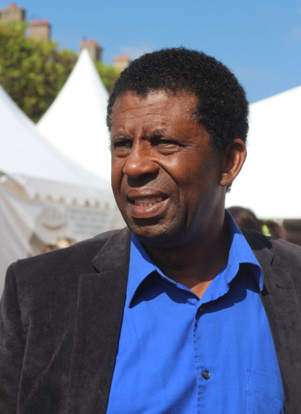 Dany Laferrière - Livre sur la Place 2014